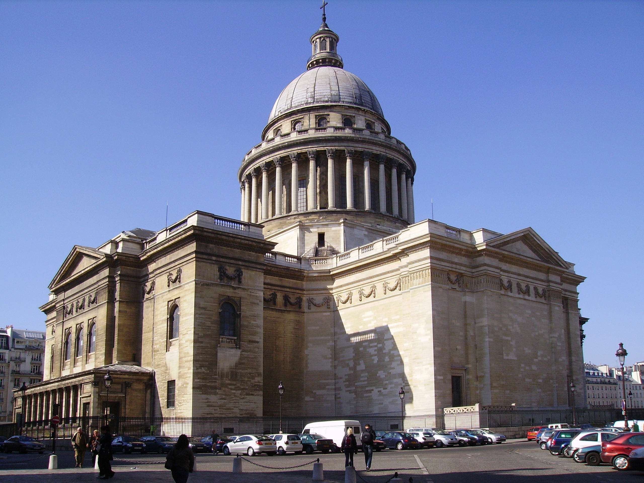 Panthéon de Paris.